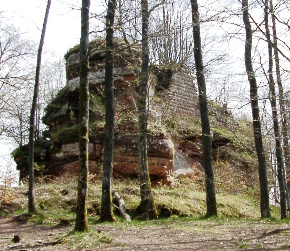 Burgruine Rothenburg